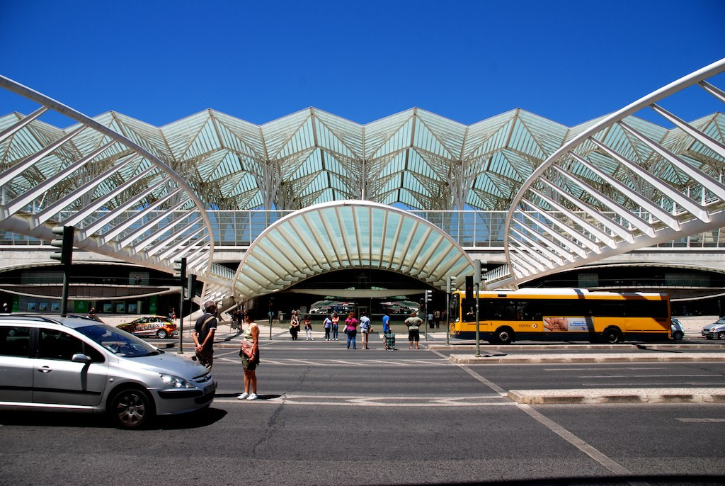 Lisboa, Portugal